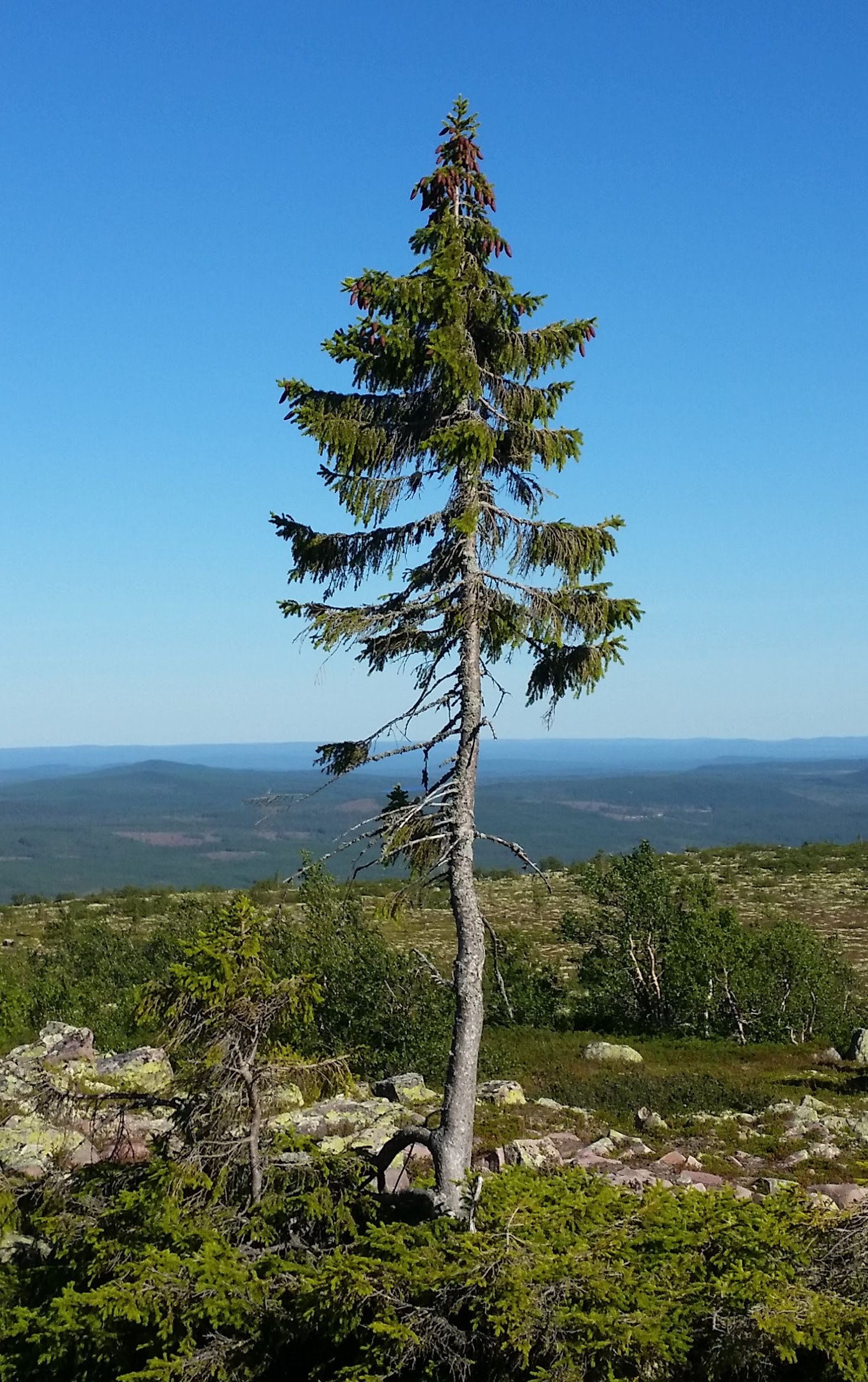 Olld Tjikko - der älteste Baum der Welt